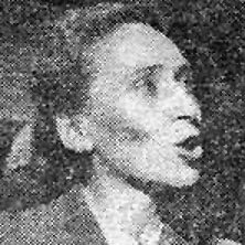 Maria de la Cruz Toledo - Chilean Senator